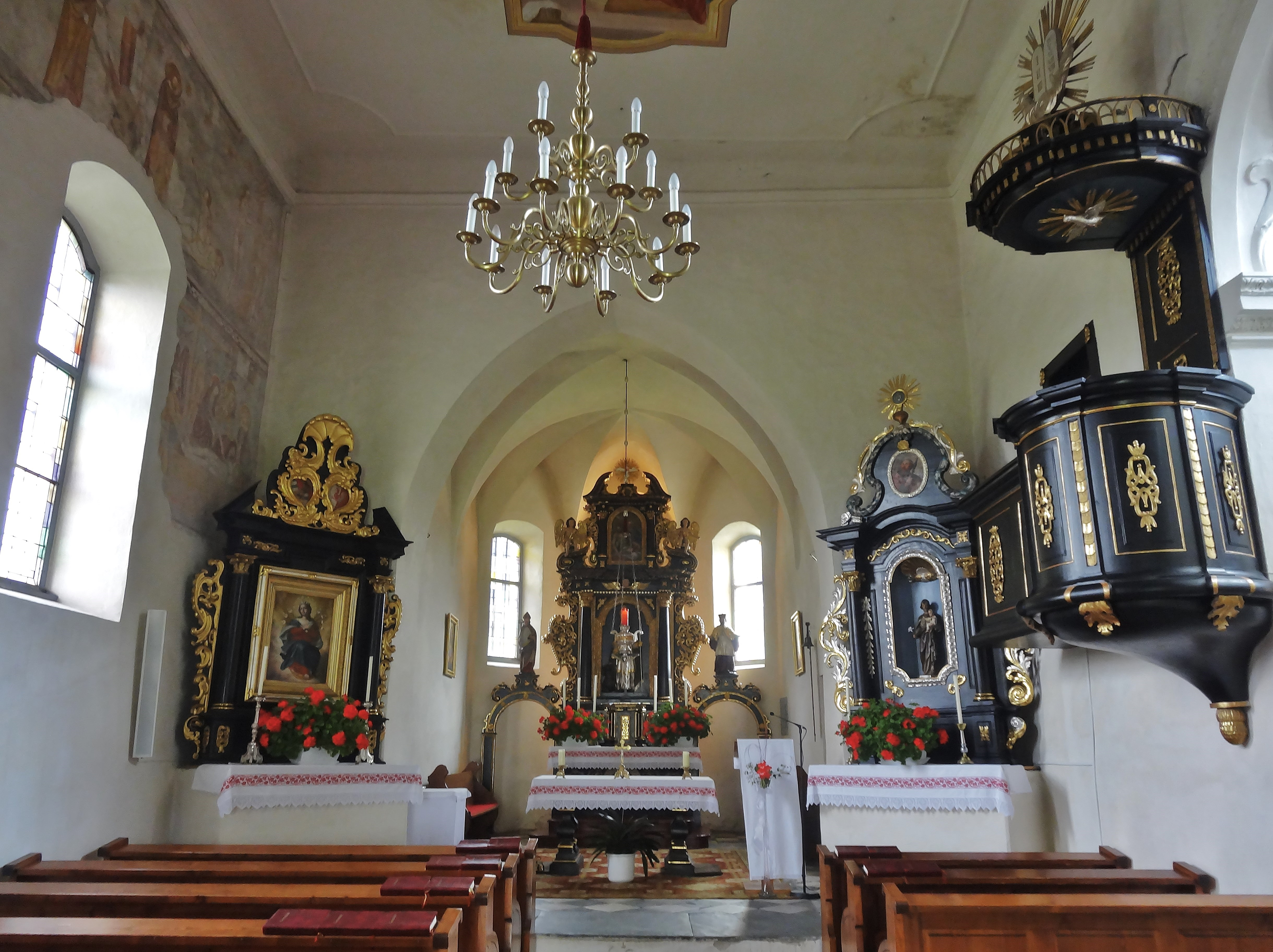 Kath. Pfarrkirche Hl. Egyd, Tigring (Moosburg), Innenansicht